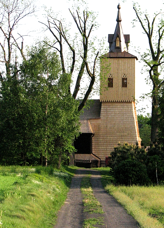 Gołkowice, kościół z XIX w. z wieżą gotycką przeniesioną w XIX w. z Pruchnej